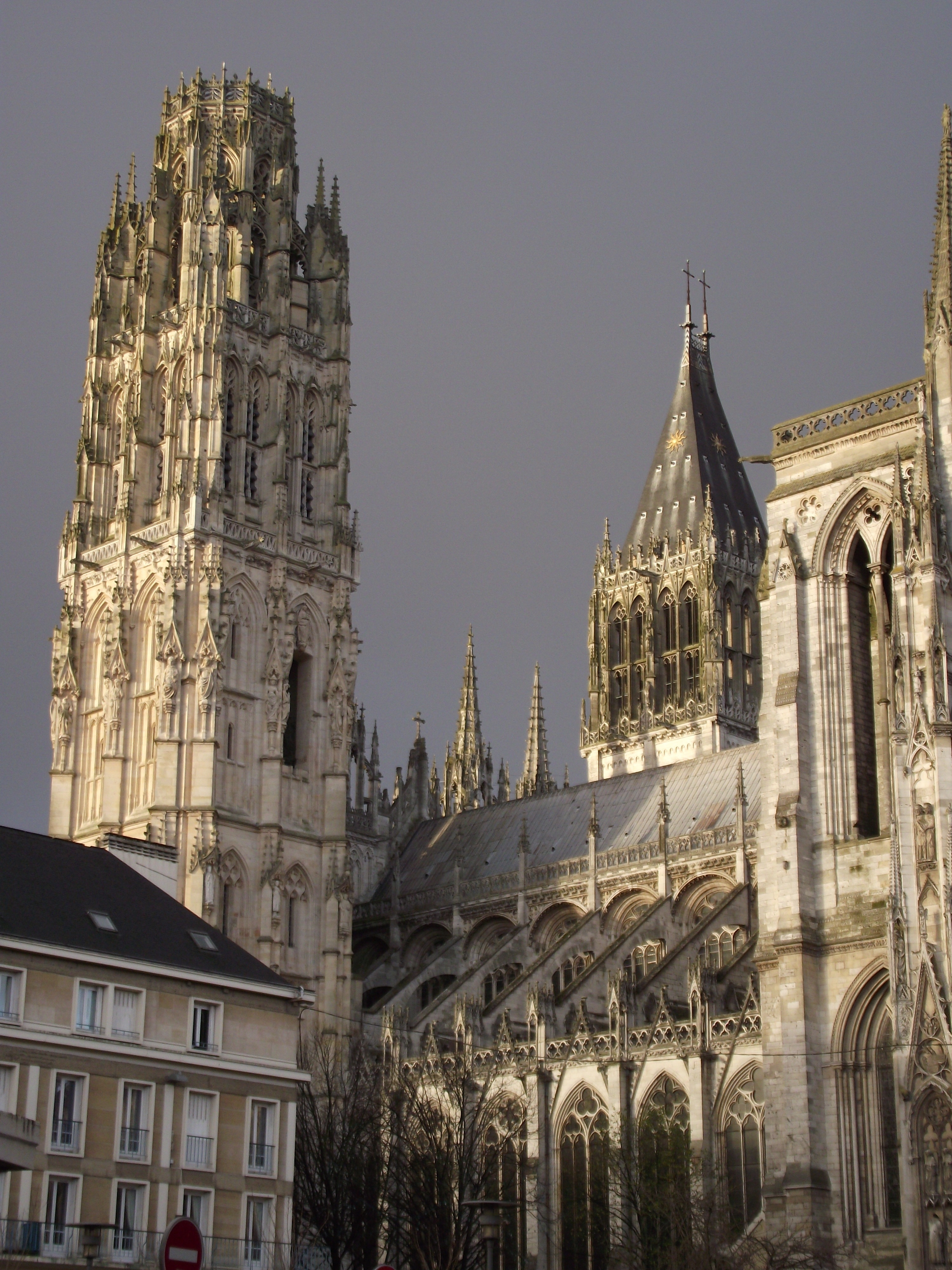 Rouen, Cathédrale Notre-Dame, Tour du Beurre